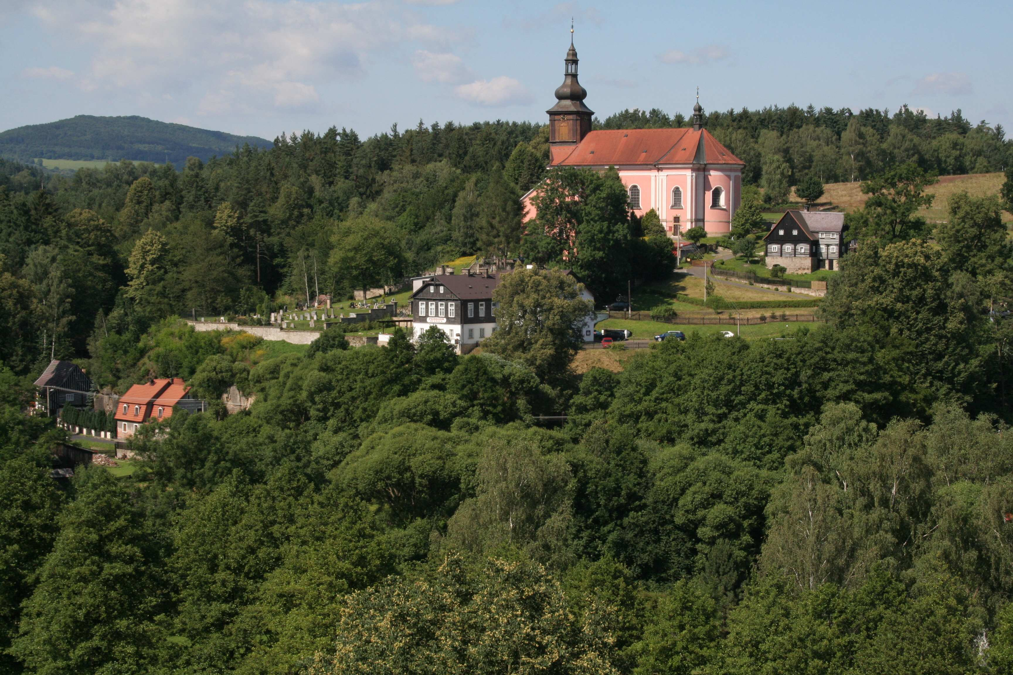 Kostel svatého Václava v Srbské Kamenici, okres Děčín